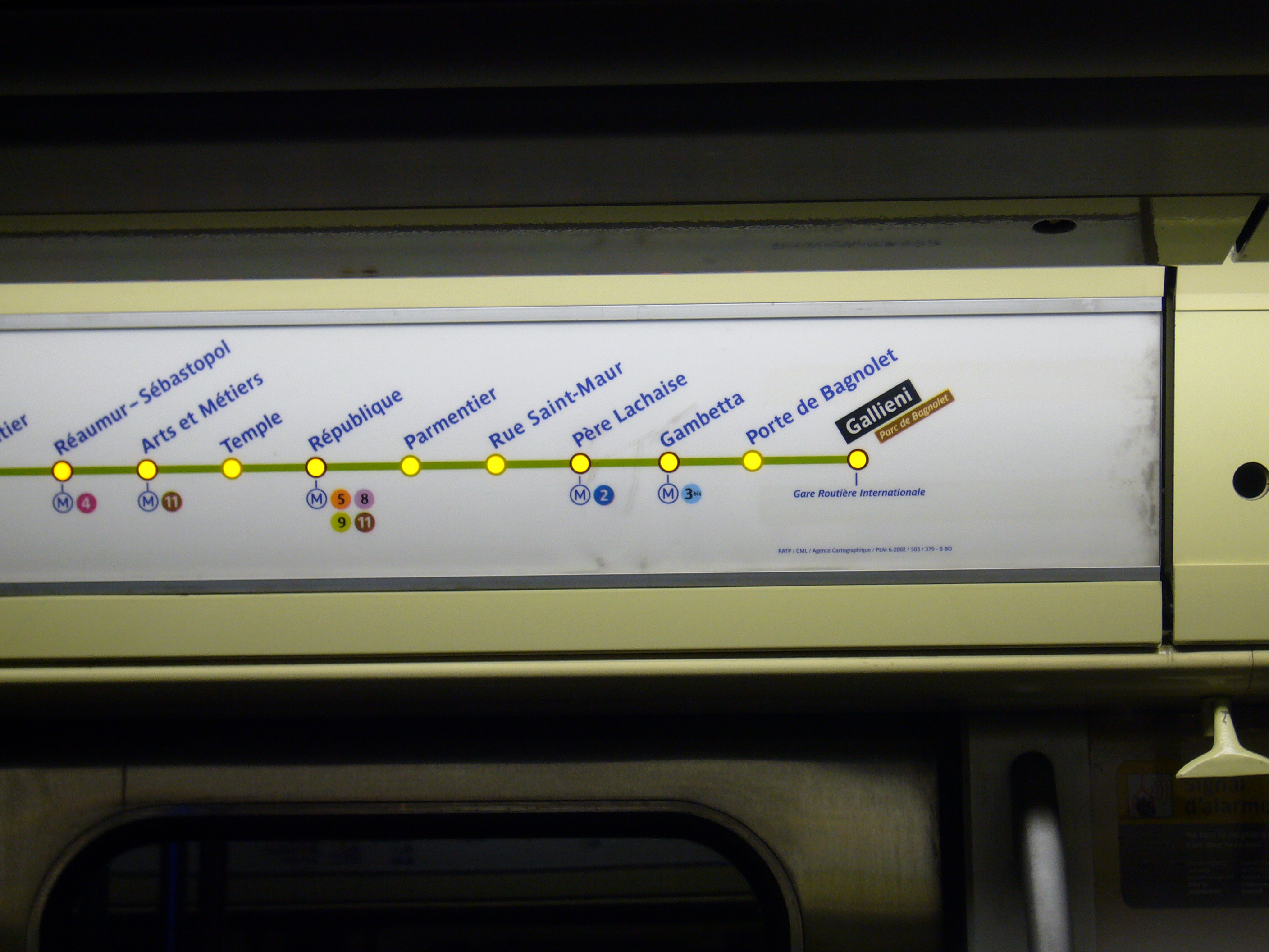 Plan lumineux du système ASVA dans un MF 67 rénové de la ligne 3 du métro de Paris.